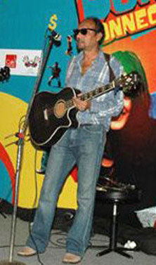 Anjan Dutt